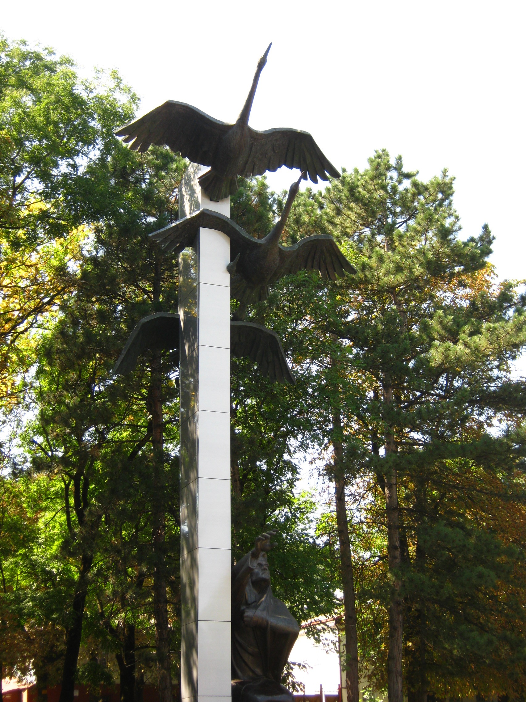 Памятник "Журавли": улица Кольцова (в сквере), Кисловодск, Ставропольский край